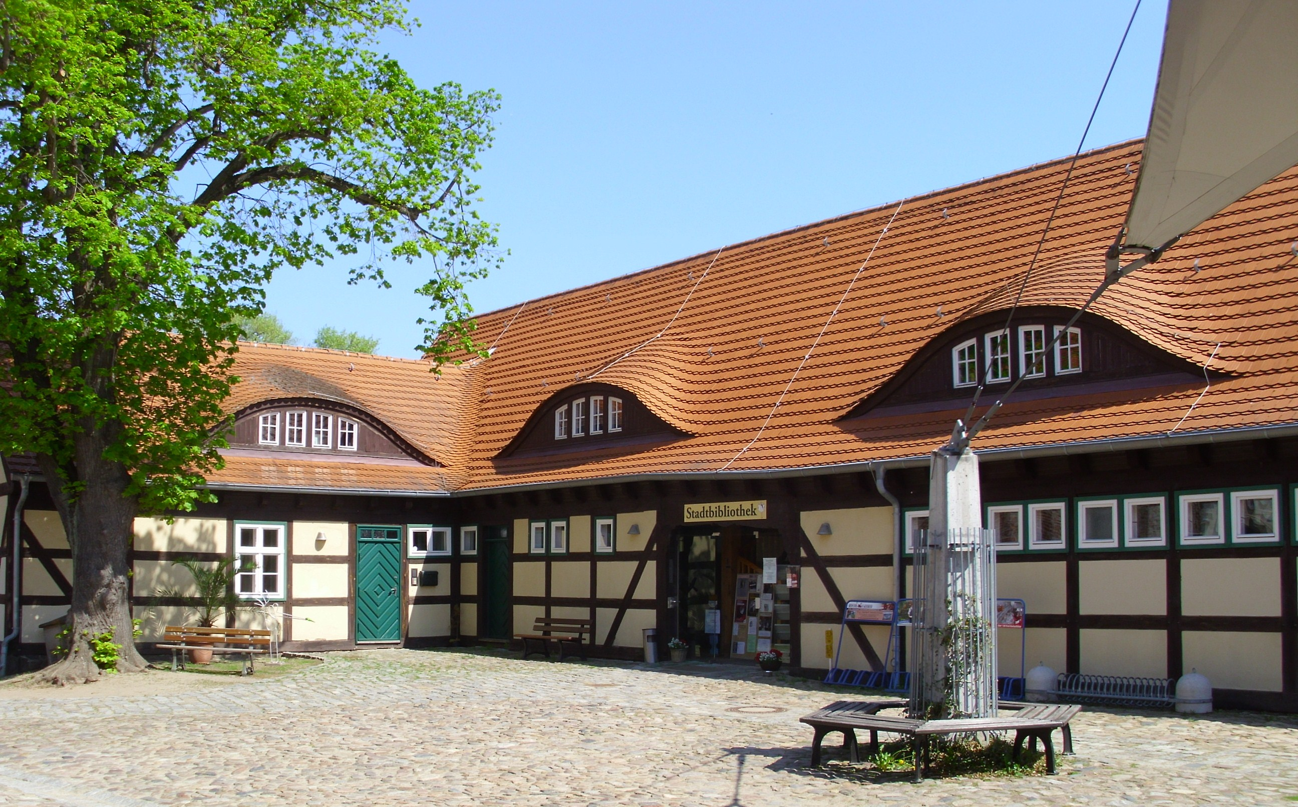 Fachwerkhaus auf dem Burghof, jetzt Städtische Bibliothek